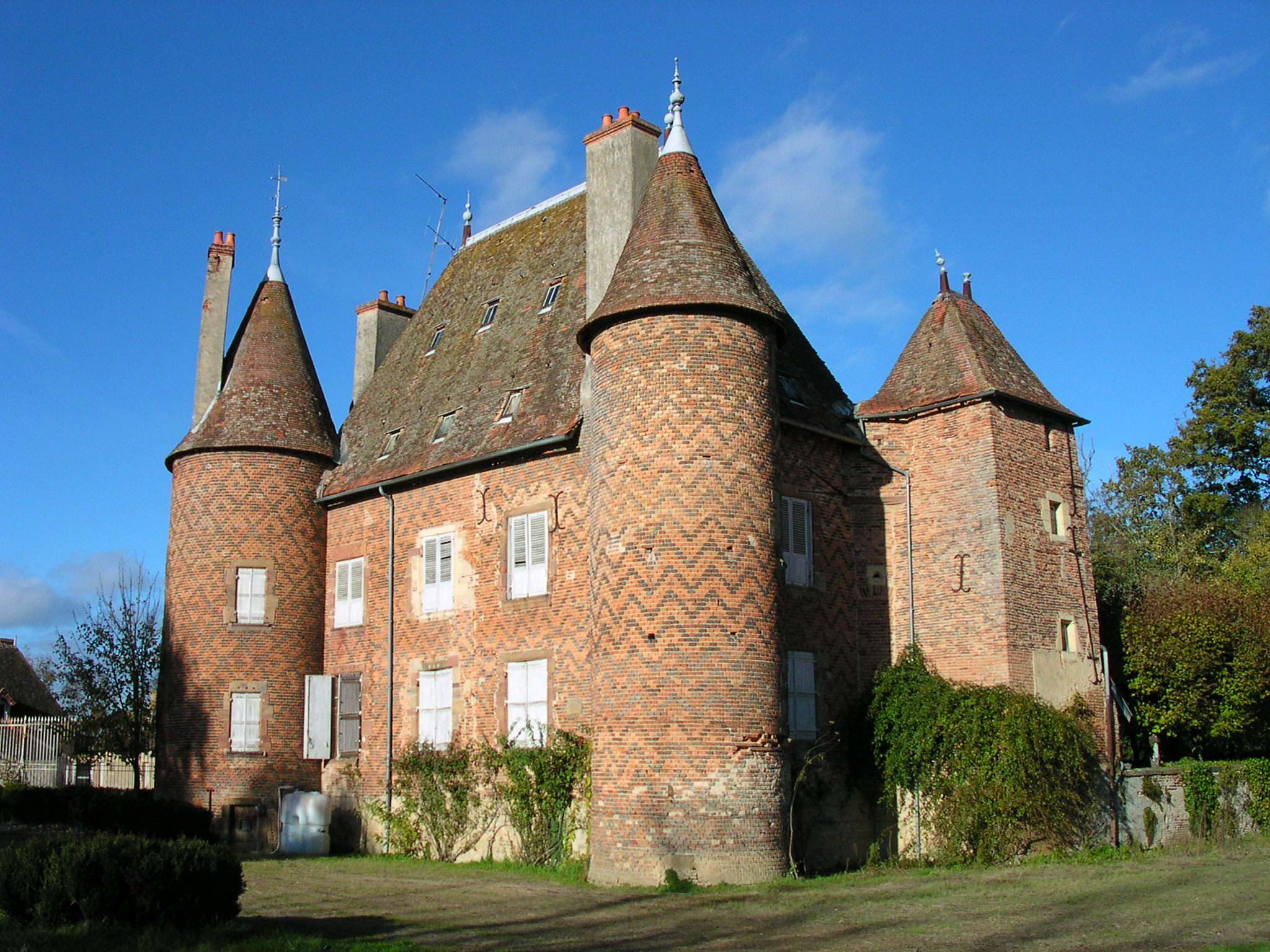 Le château de la Cour à Chapeau, Allier